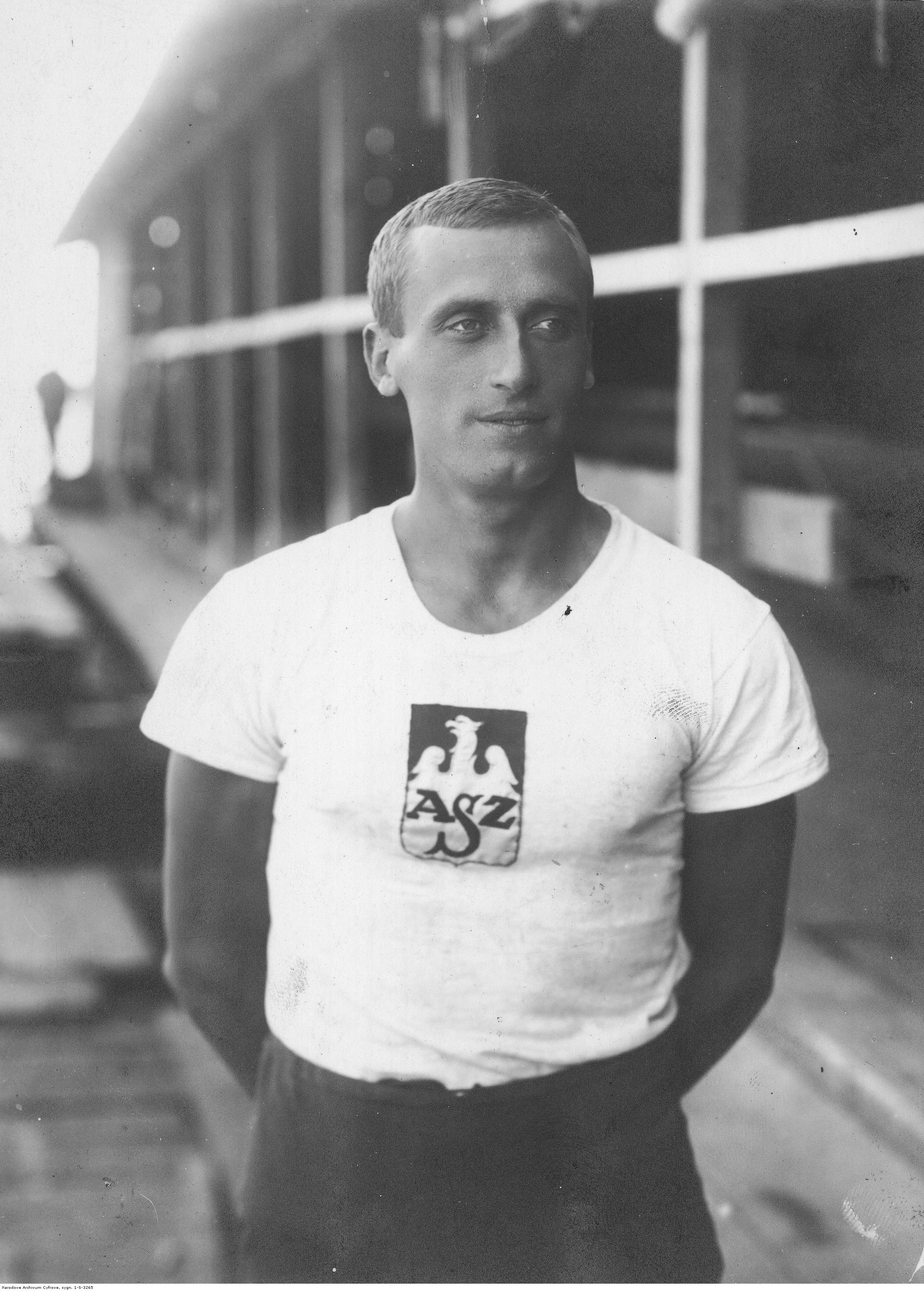 Otton Gordziałkowski, wioślarz - fotografia sytuacyjna (w stroju sportowym).